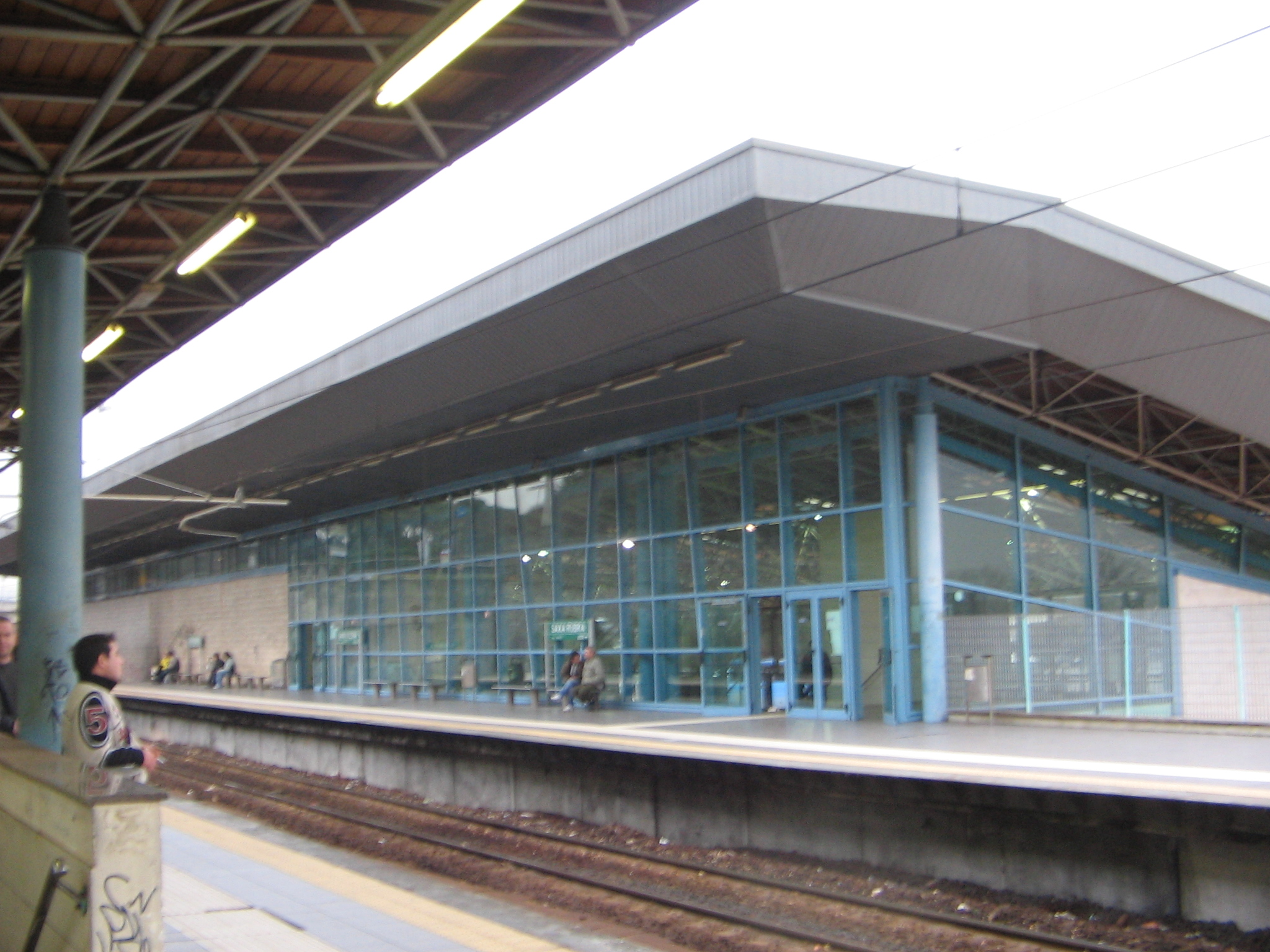 Roma, stazione Saxa Rubra della ferrovia Roma-Viterbo